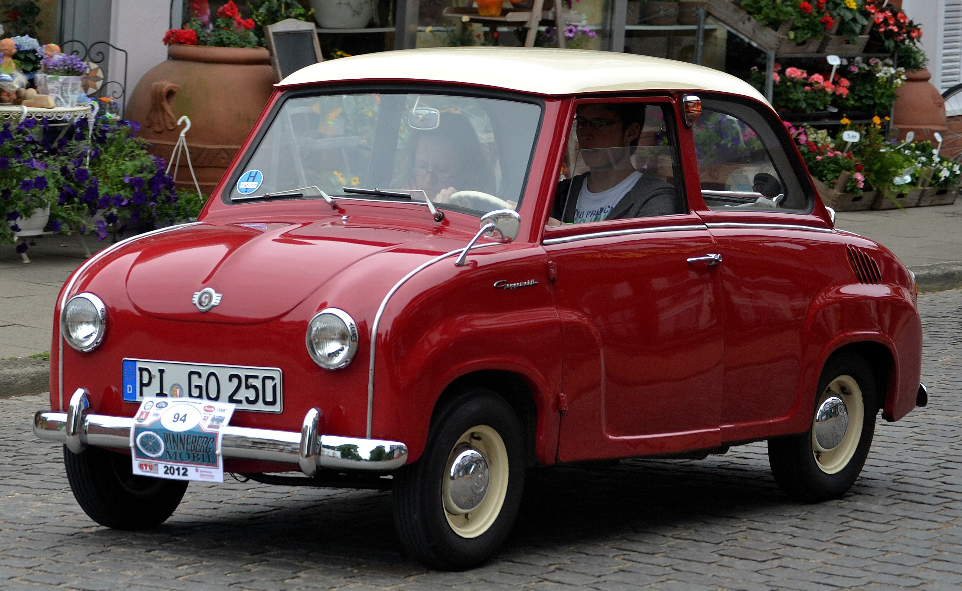 Glas Goggomobil T 250 Baujahr 1968 während der Pinneberg Mobil beim Eintreffen in Uetersen